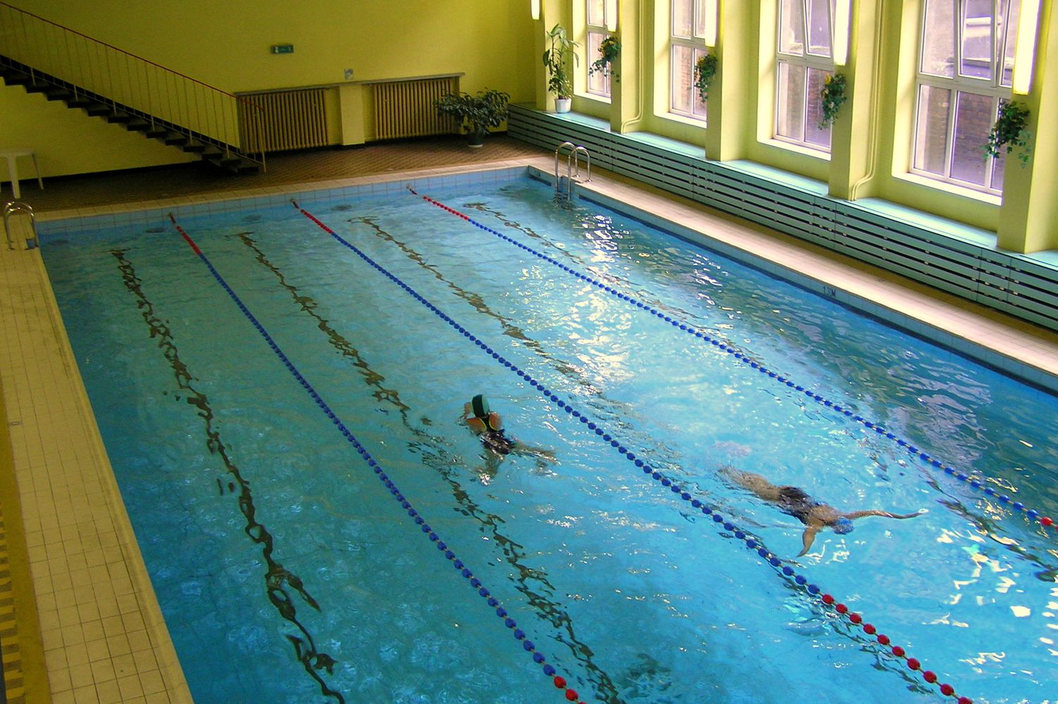 Pływalnia w II LO w Katowicach